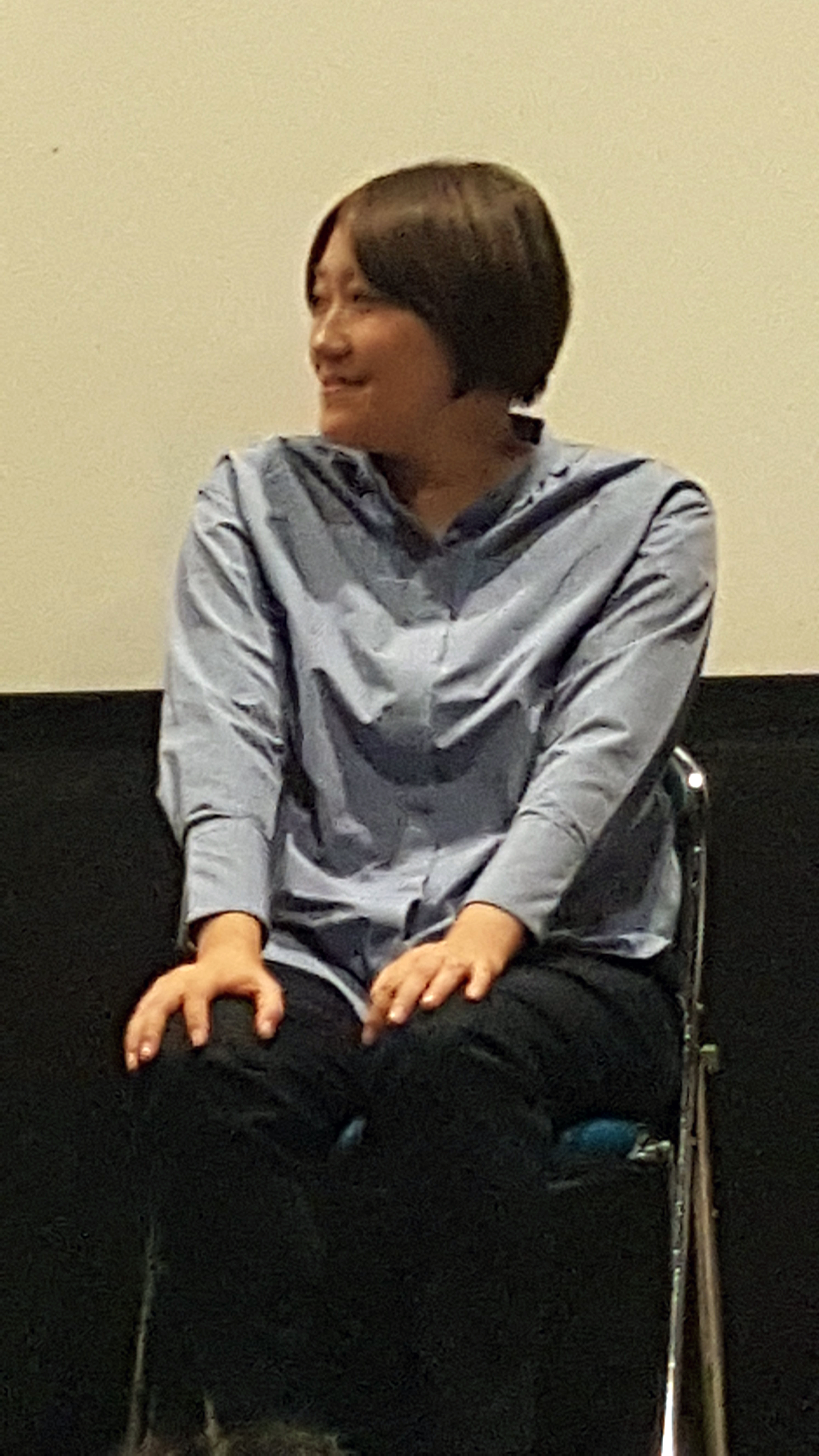 映画「バージン協奏曲 それゆけ純白パンツ!」公開舞台挨拶（2019年）